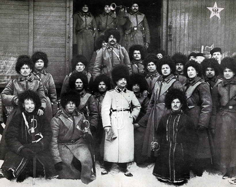 Уникальное невоспроизводимое фото 1904-1905 г.: Из Гатчины на японский фронт (Русско-японская война) в Маньчжурию воевать с японцами отправляется 23-я артиллерийская бригада. Зима 1904 года. По просьбе фотокорреспондента Виктора Буллы канониры картинно выстроились для парадного снимка. Любопытная деталь: на двери вагона красуется пятиконечная звезда с двуглавым имперским орлом в центре.